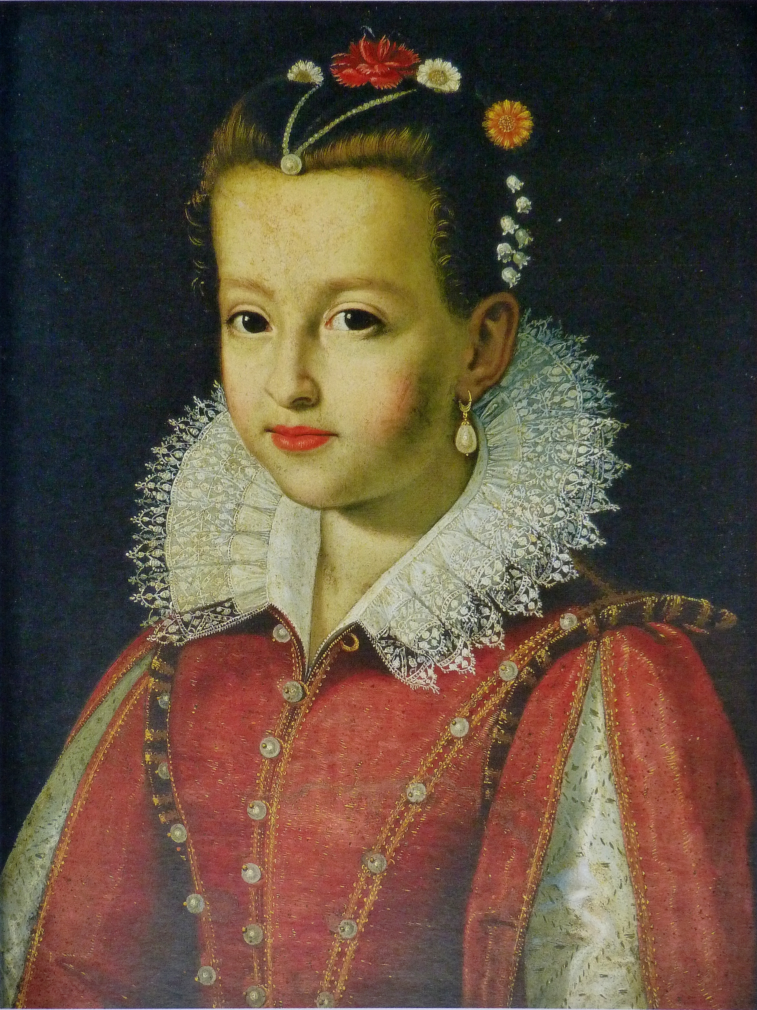 Portrait de Marie de Médicis jeune